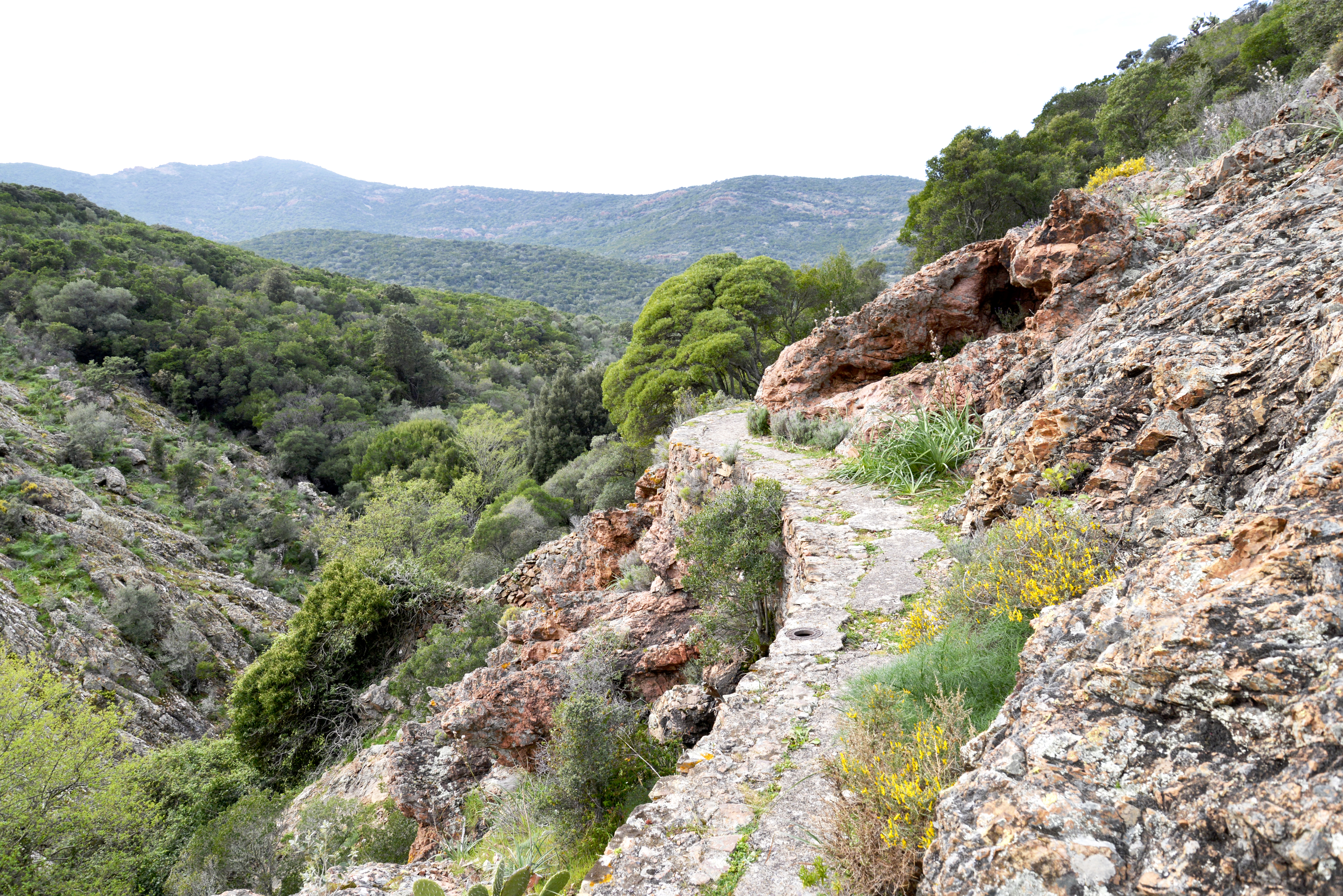 Galéria, Filosorma (Haute-Corse) - Ouvrage construit le long de la rive droite abrupte du ruisseau de Tavulaghjiu, pour amener l'eau du lac de Calca Tavulaghjiu au village, qui sert aussi de sentier.